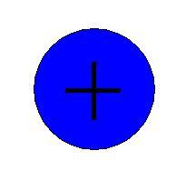 grafické znázornění kationtu